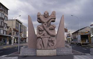 Monument pour la Resistance à la Courneuve